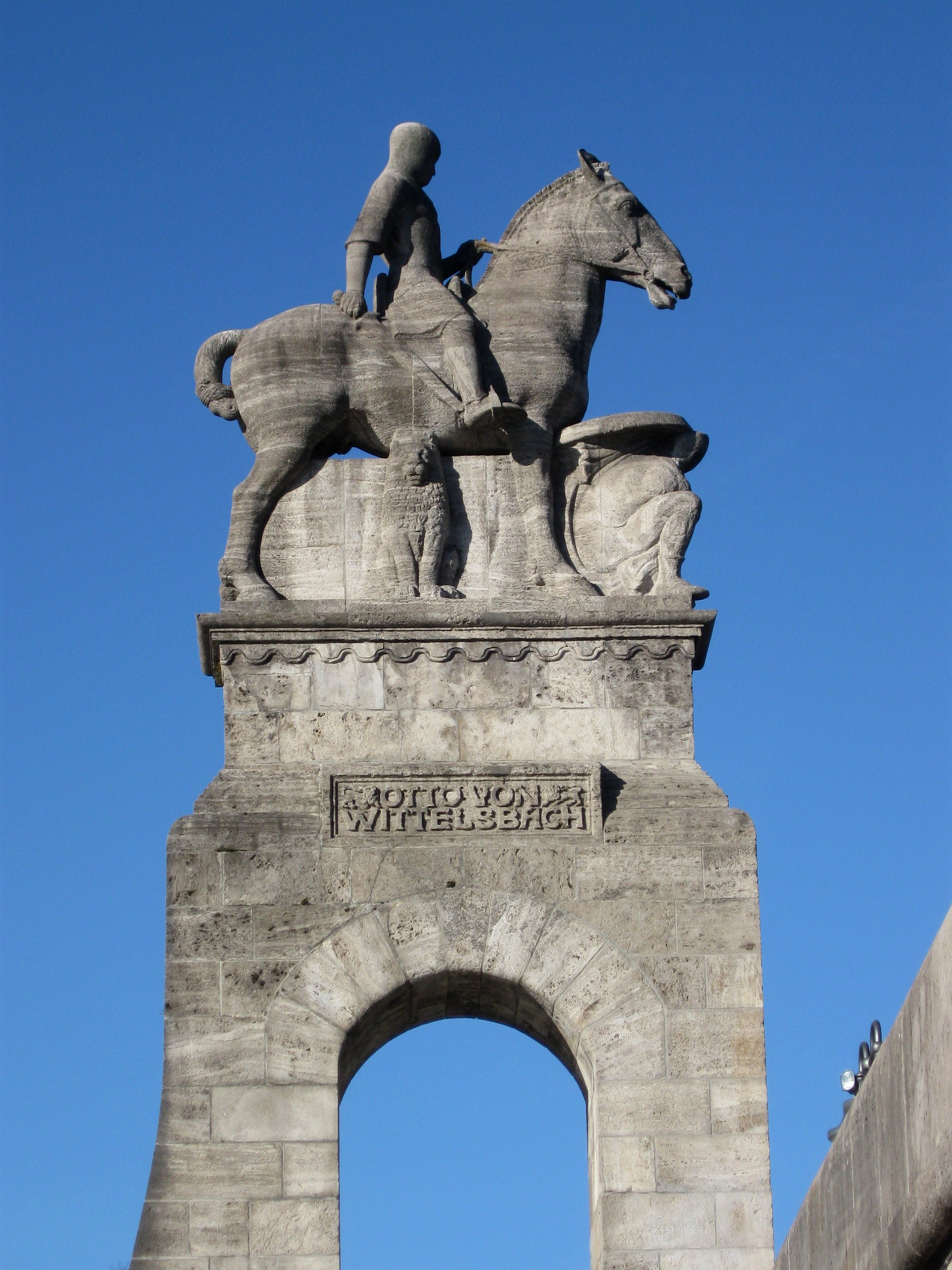 Wittelsbacherbrücke, vierbogige Steinbrücke mit Jugendstilgeländer, 1904-05 von Theodor Fischer; am westlichen Brückenpfeiler steinerner Pylon mit Reiterfigur Ottos von Wittelsbach, von Georg Wrba.